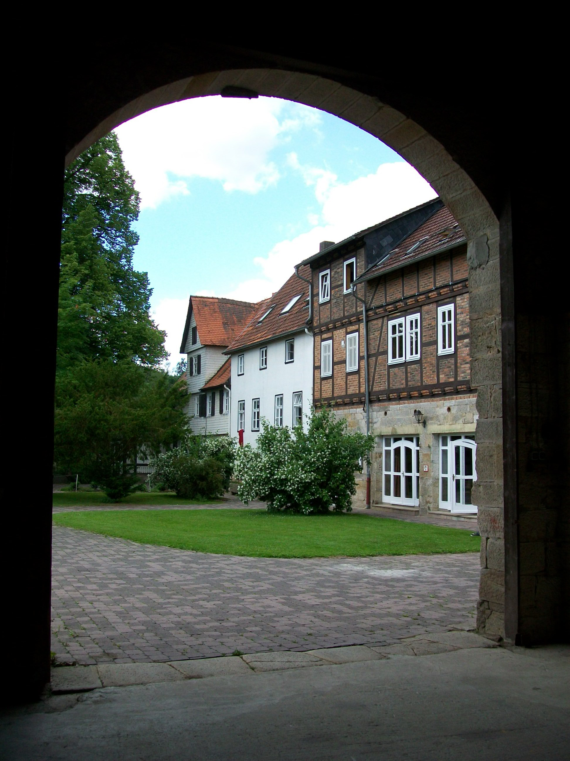 Gut Kragenhof (Kassel, Deutschland)